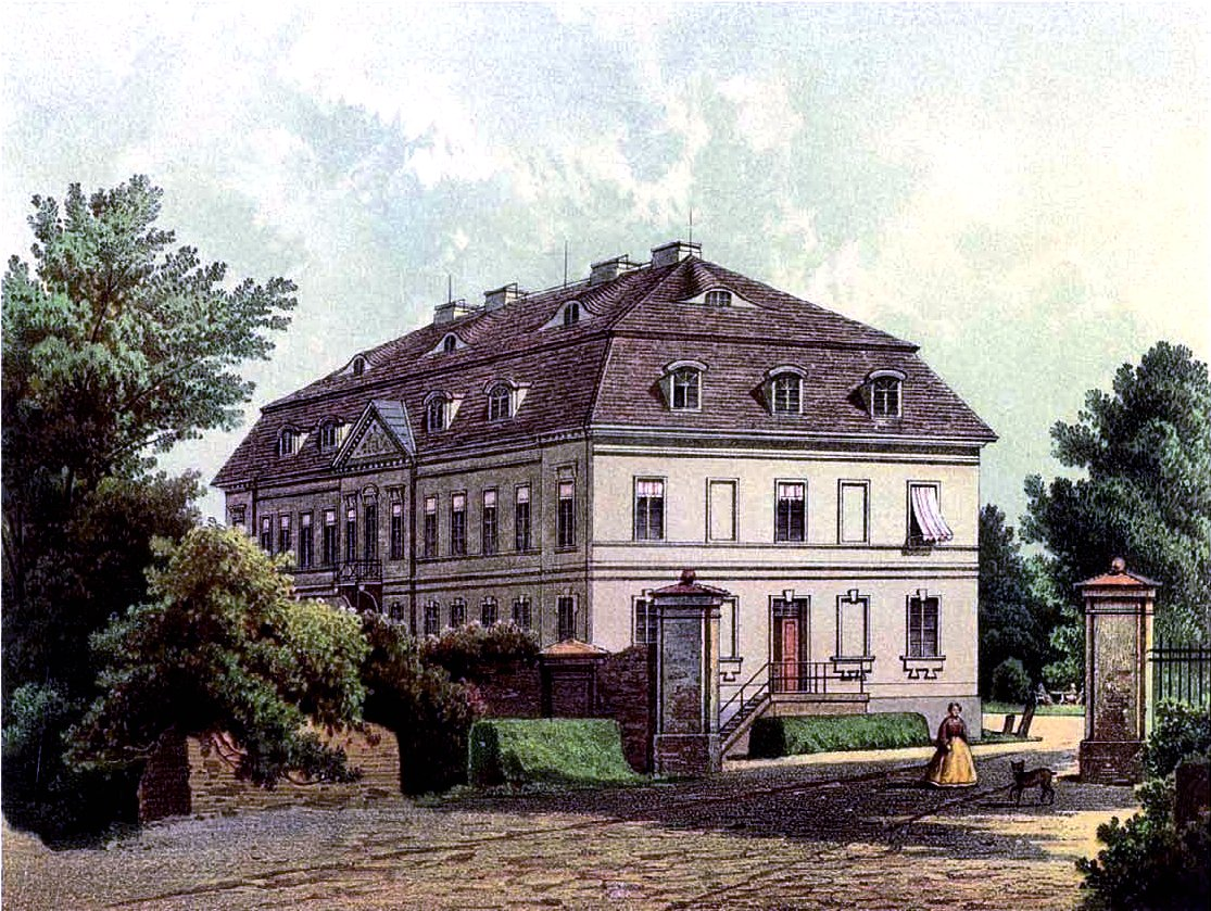 Schloss Straupitz, Kreis Lübben, Provinz Brandenburg